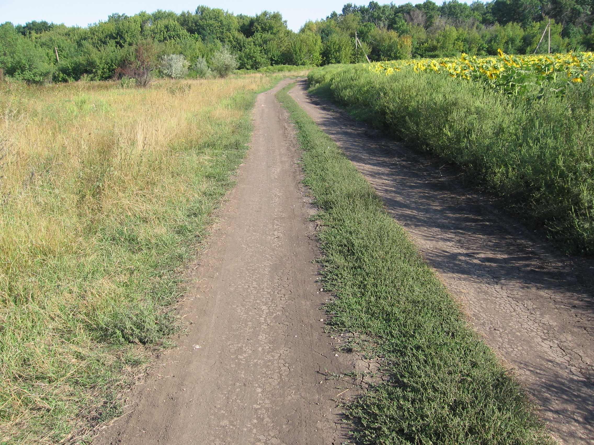 Польова дорога